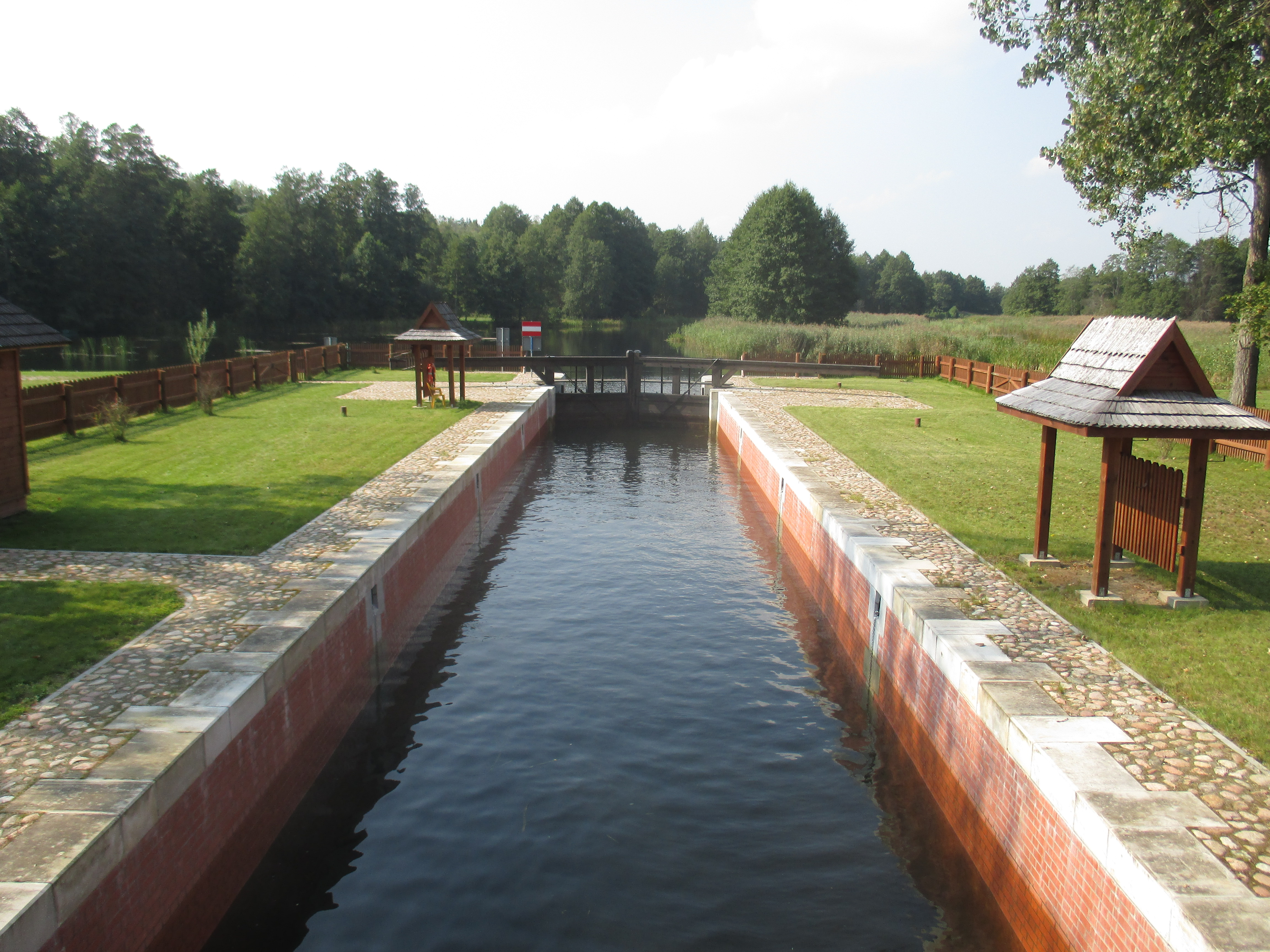 Widok na górne wrota śluzy